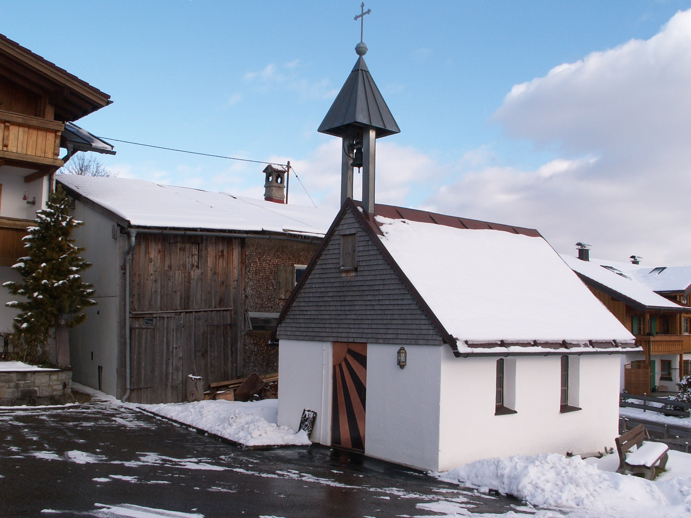 Kapelle in Tiefenberg, Ofterschwang